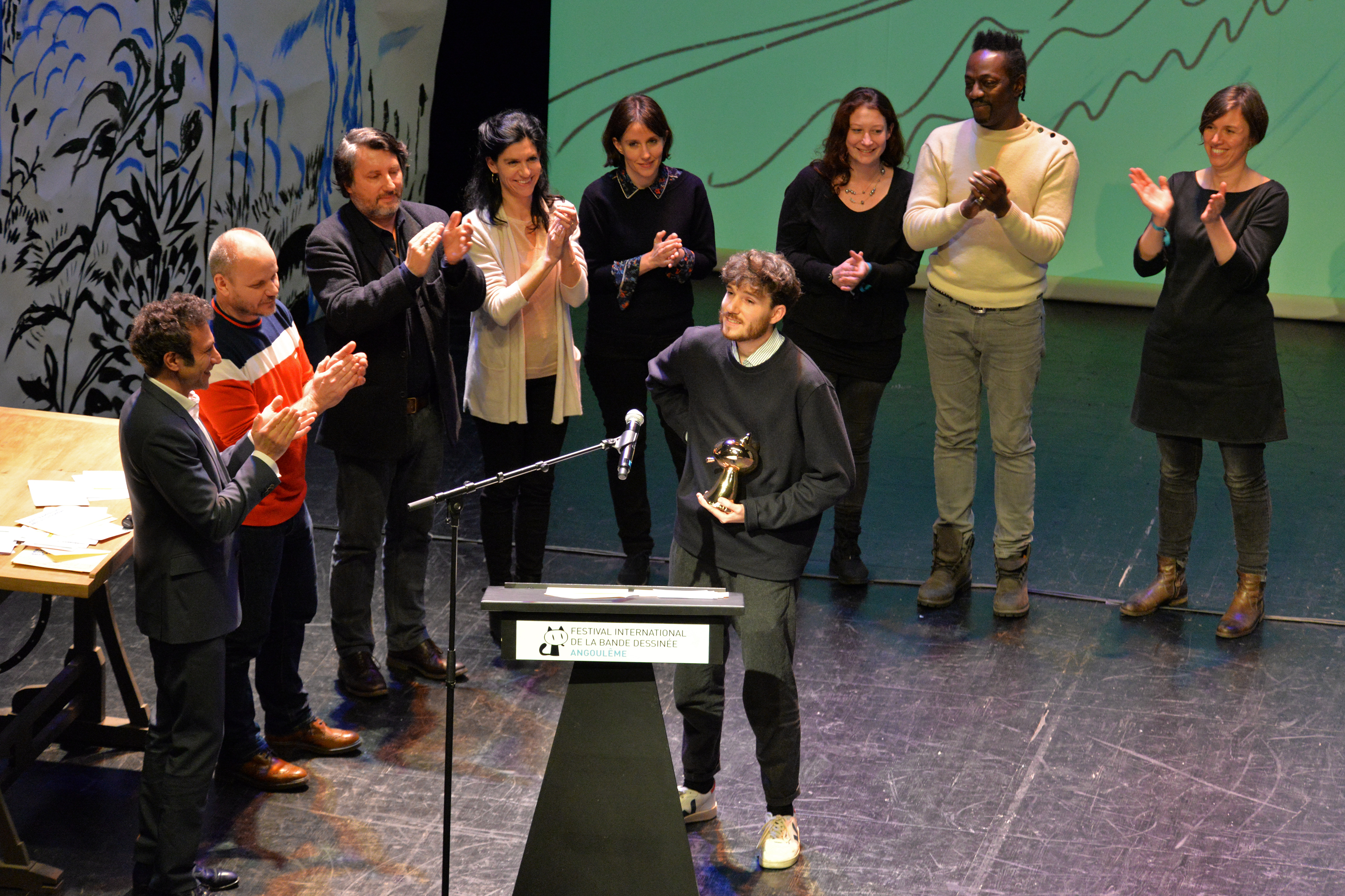 Jérémie Moreau, Fauve d'or, avec le jury à la cérémonie de remise des prix, Festival d'Angoulême 2018.